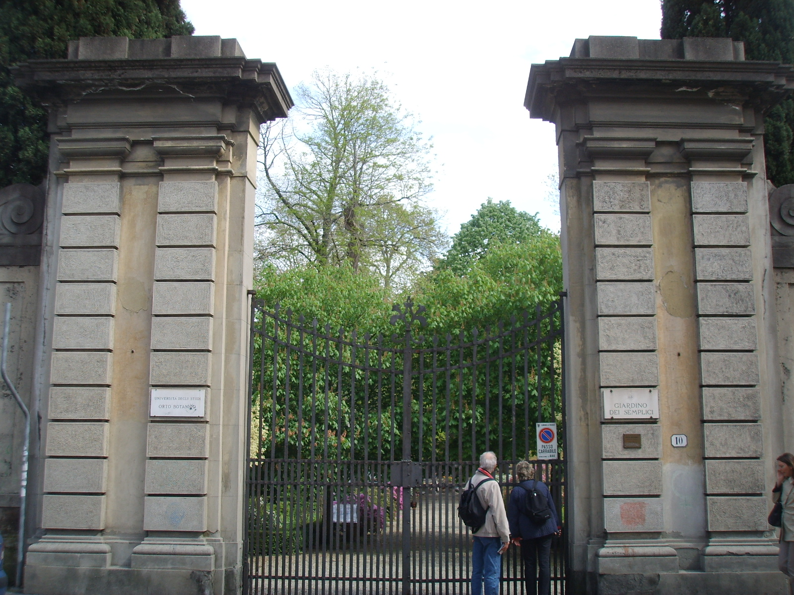 Giardino dei semplici ingresso